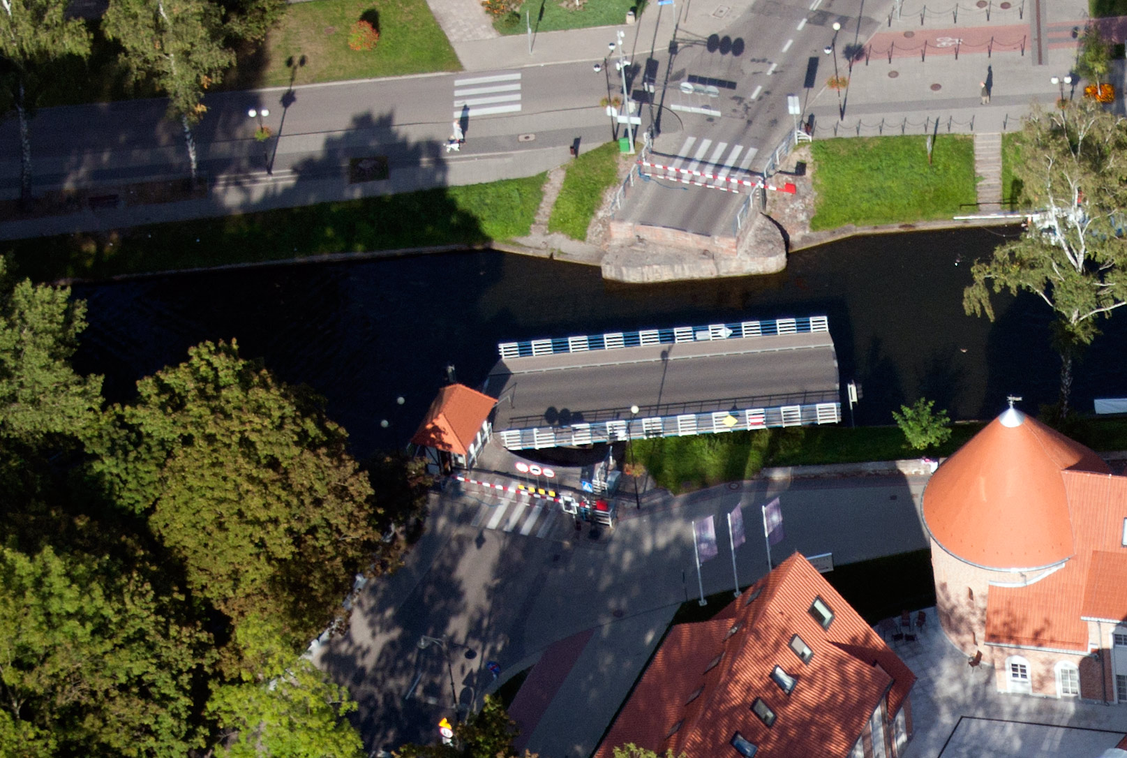 most obrotowy na Kanale Łuczańskim wraz z urządzeniami Giżycko, Giżycko (gmina miejska)